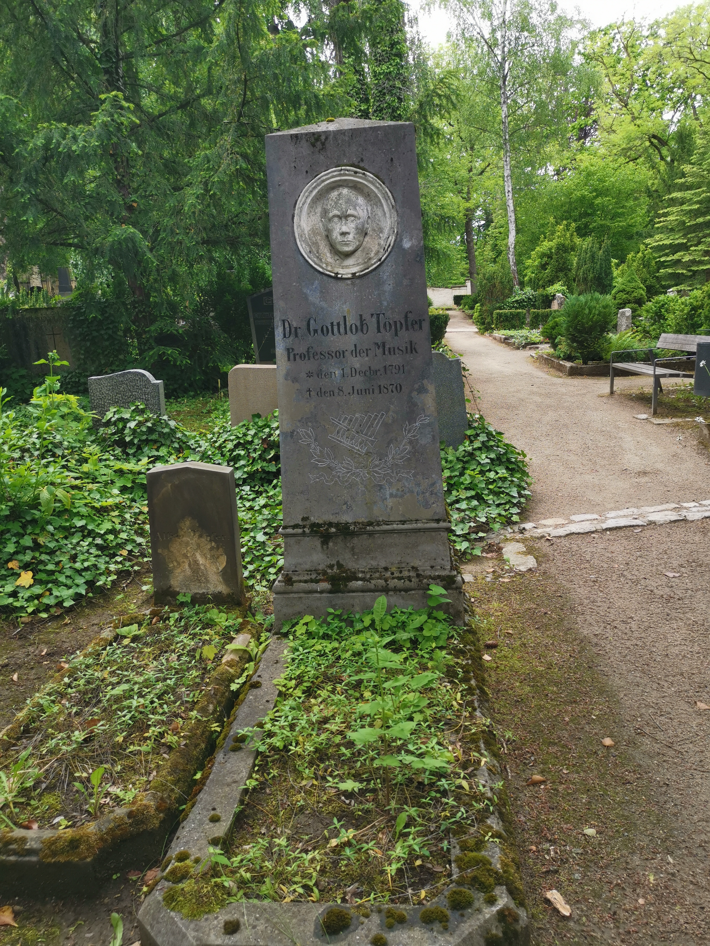 Grabstätte Prof. Johann Gottlob Töpfer; Historischer Friedhof Weimar